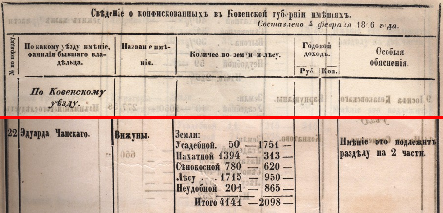 1866 m. sudarytas Kauno gubernijoje nusavintų valdų sąrašas